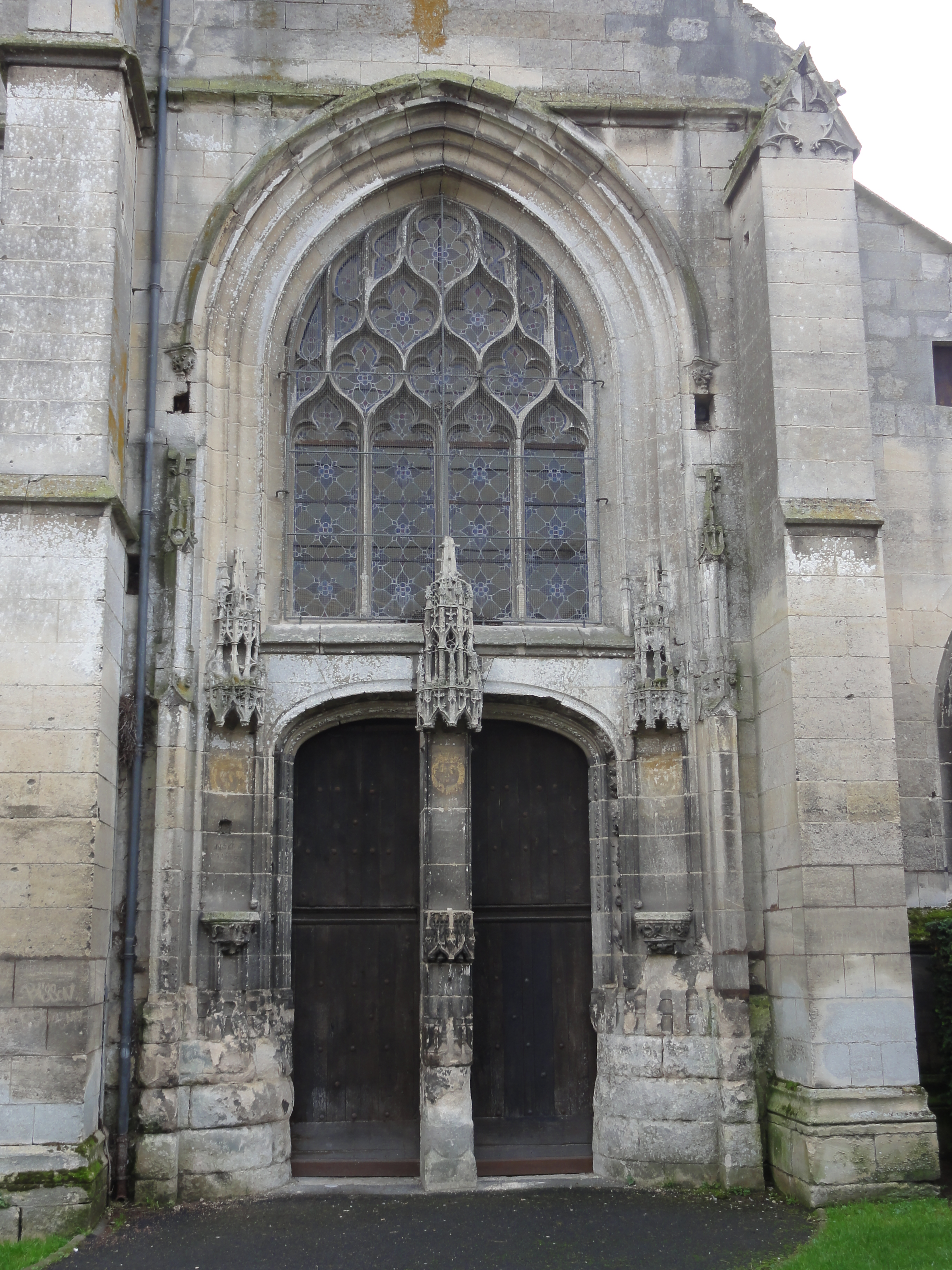 Portail occidental.